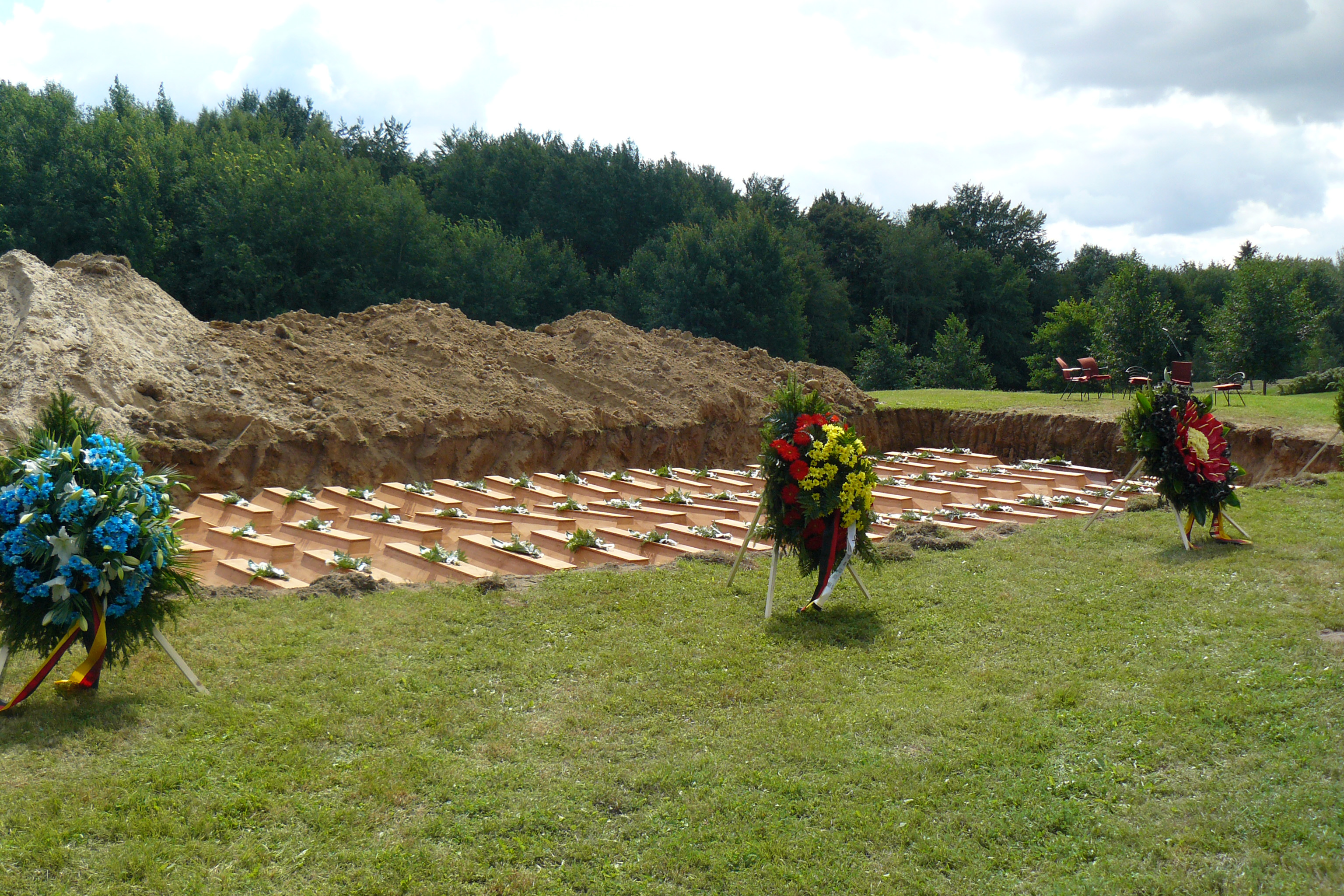 Gräberfeld ziviler Opfer aus Marienburg (Malbork) auf dem Deutschen Soldatenfriedhof in Glinna, Gemeinde Stare Czarnowo. Es handelt sich um 2116 zivile Opfer die im Oktober 2008 unweit der Marienburg im heutigen Malbork bei Tiefbauarbeiten gefunden wurden.